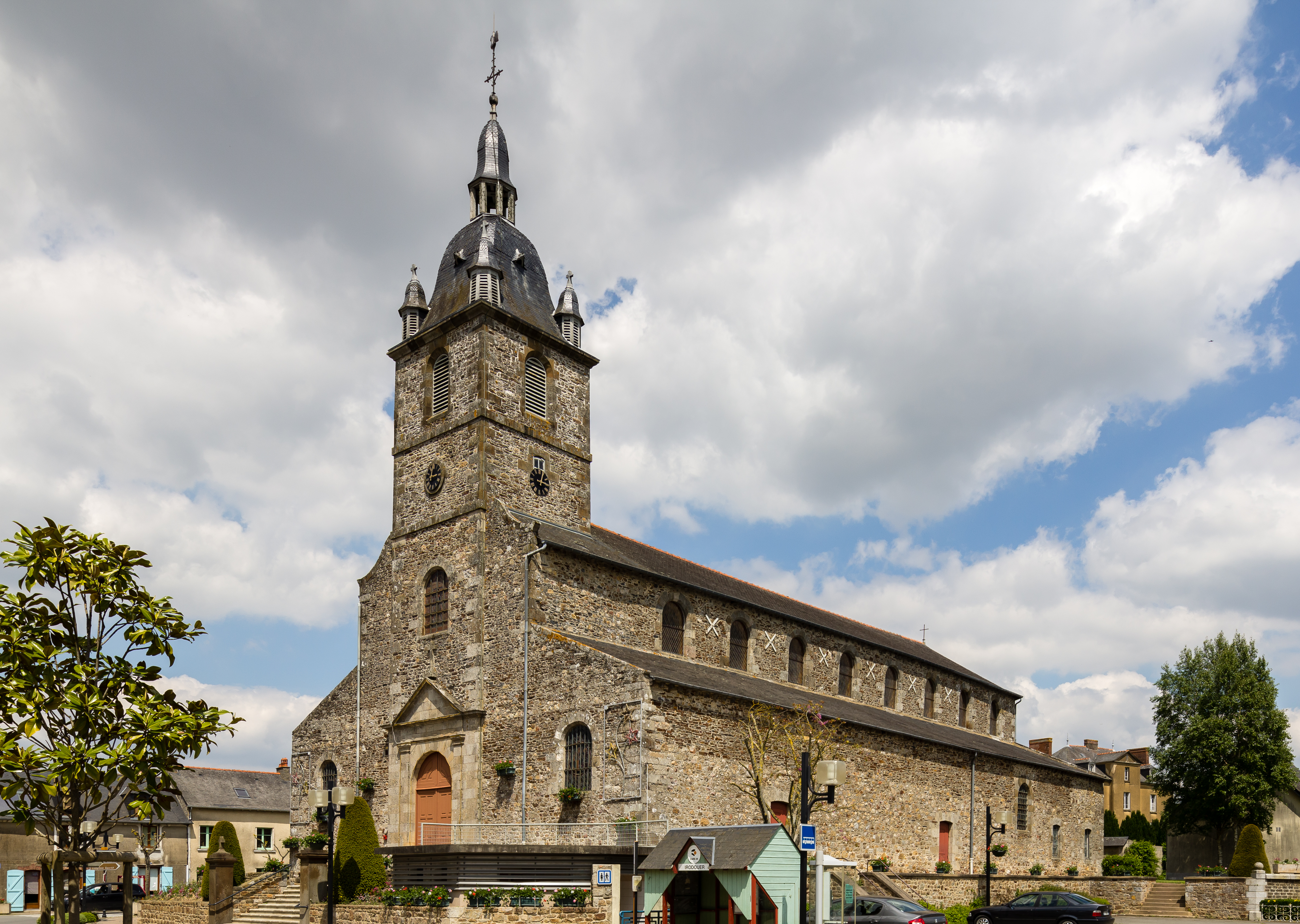 Église Saint-Pierre d'Irodouër (France).